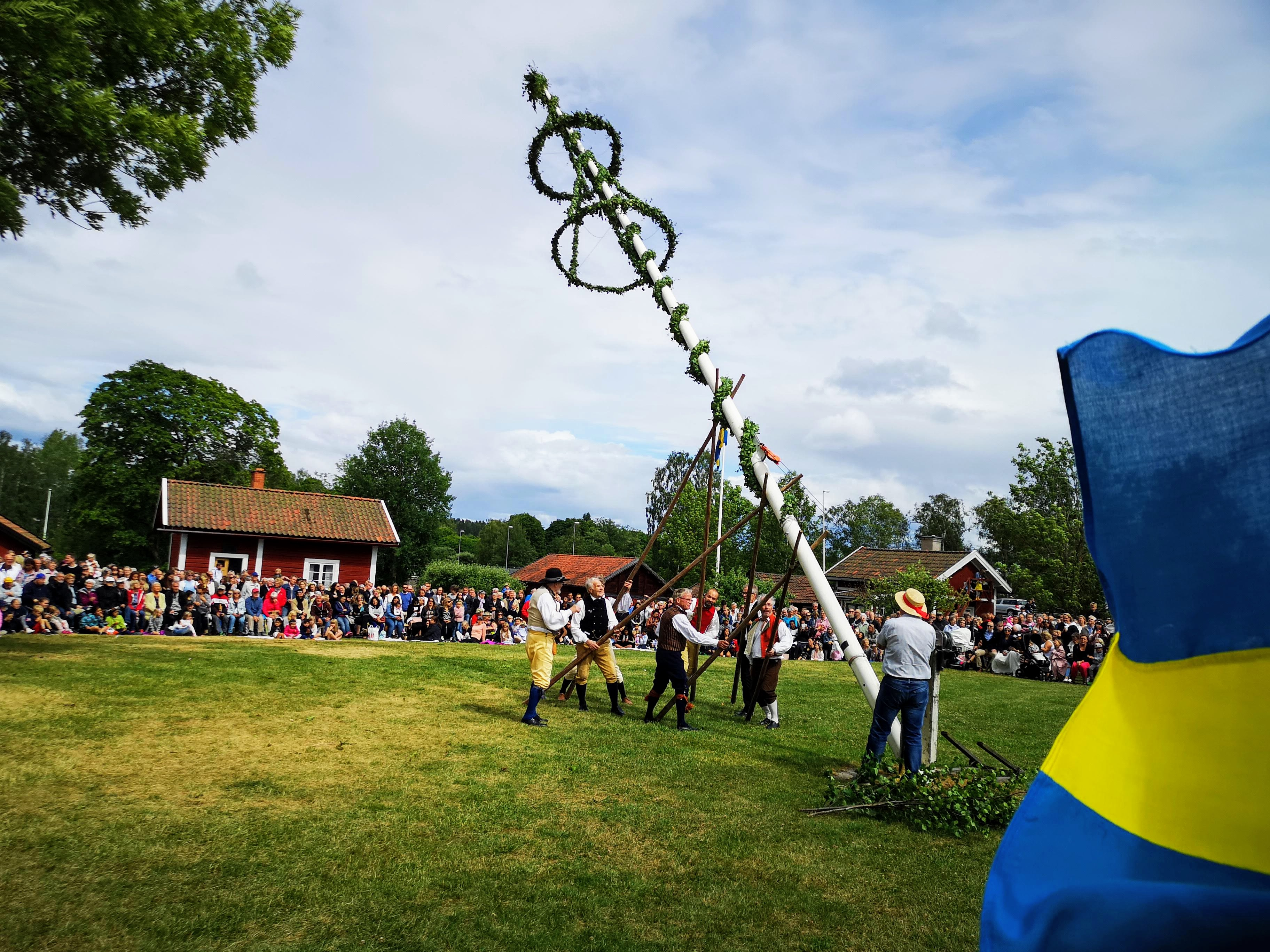 Västanfors Hembygdsgård i Fagersta, en mötesplats för Fagerstabor och turister. Midsommarafton är årets höjdpunkt!